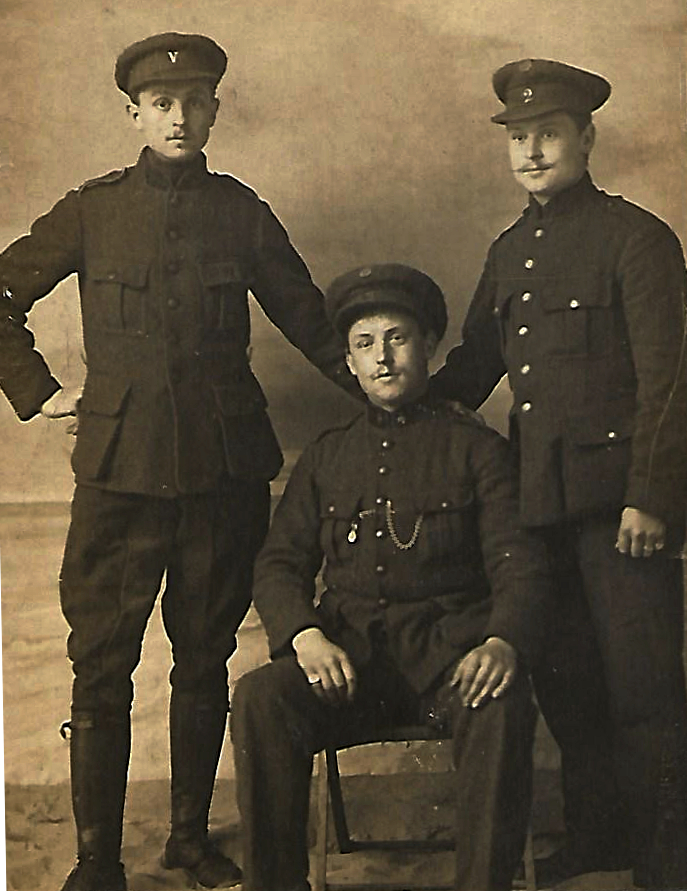 Gebroeders Van der Stock tijdens de Eerste Wereldoorlog